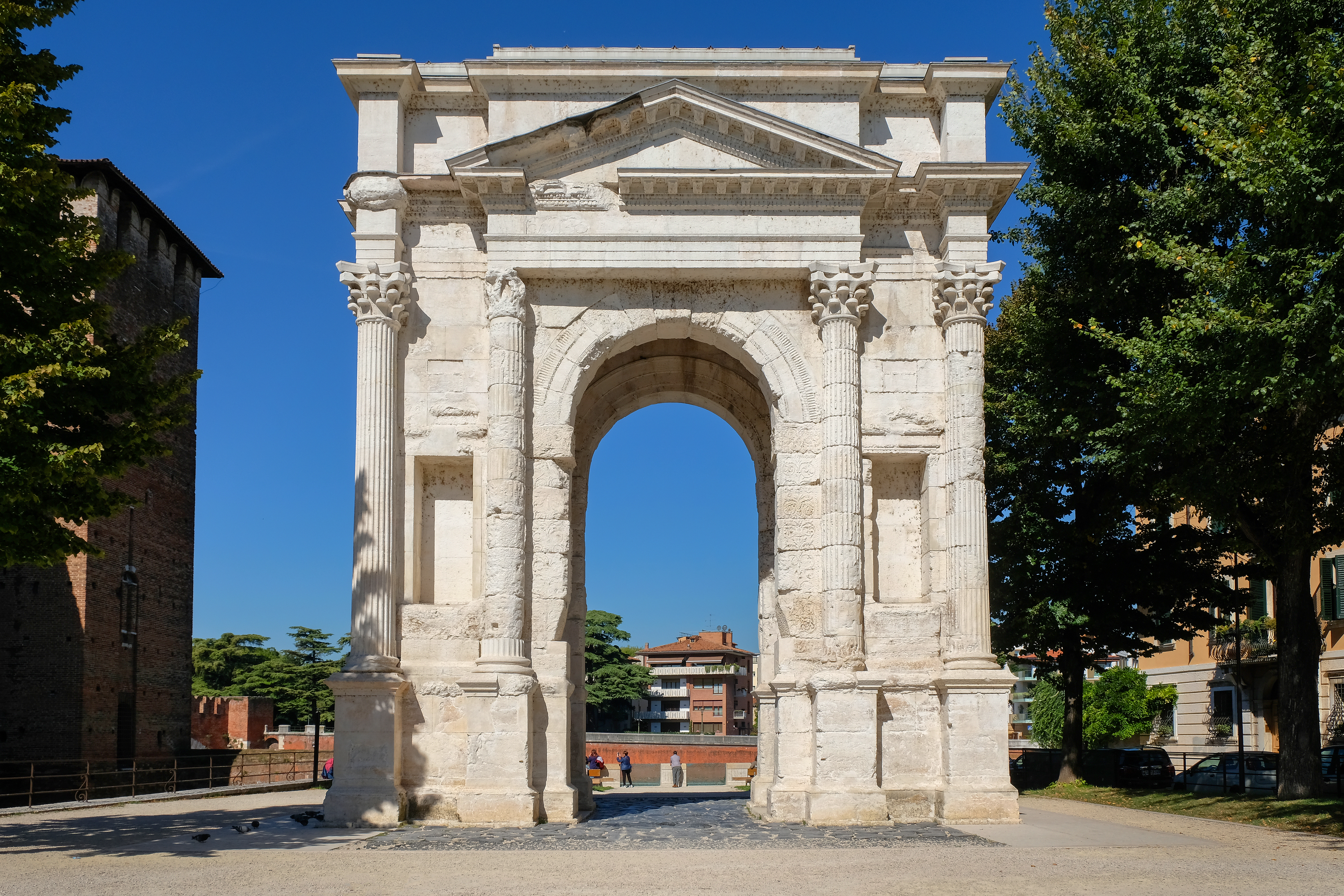 Arco dei Gavi This is a photo of a monument which is part of cultural heritage of Italy.